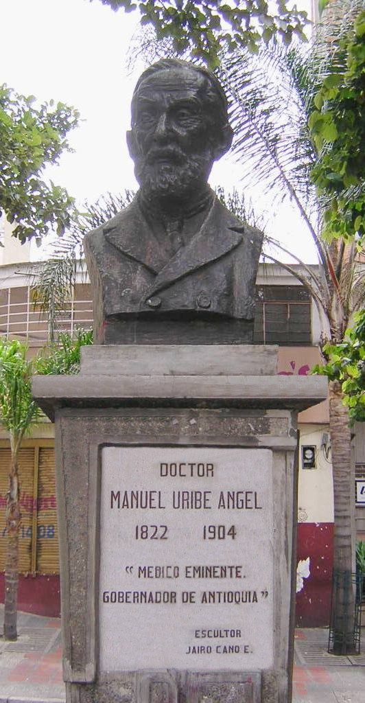 Busto de Manuel Uribe Angel, ubicado en la Av. la Playa, Medellín, Colombia